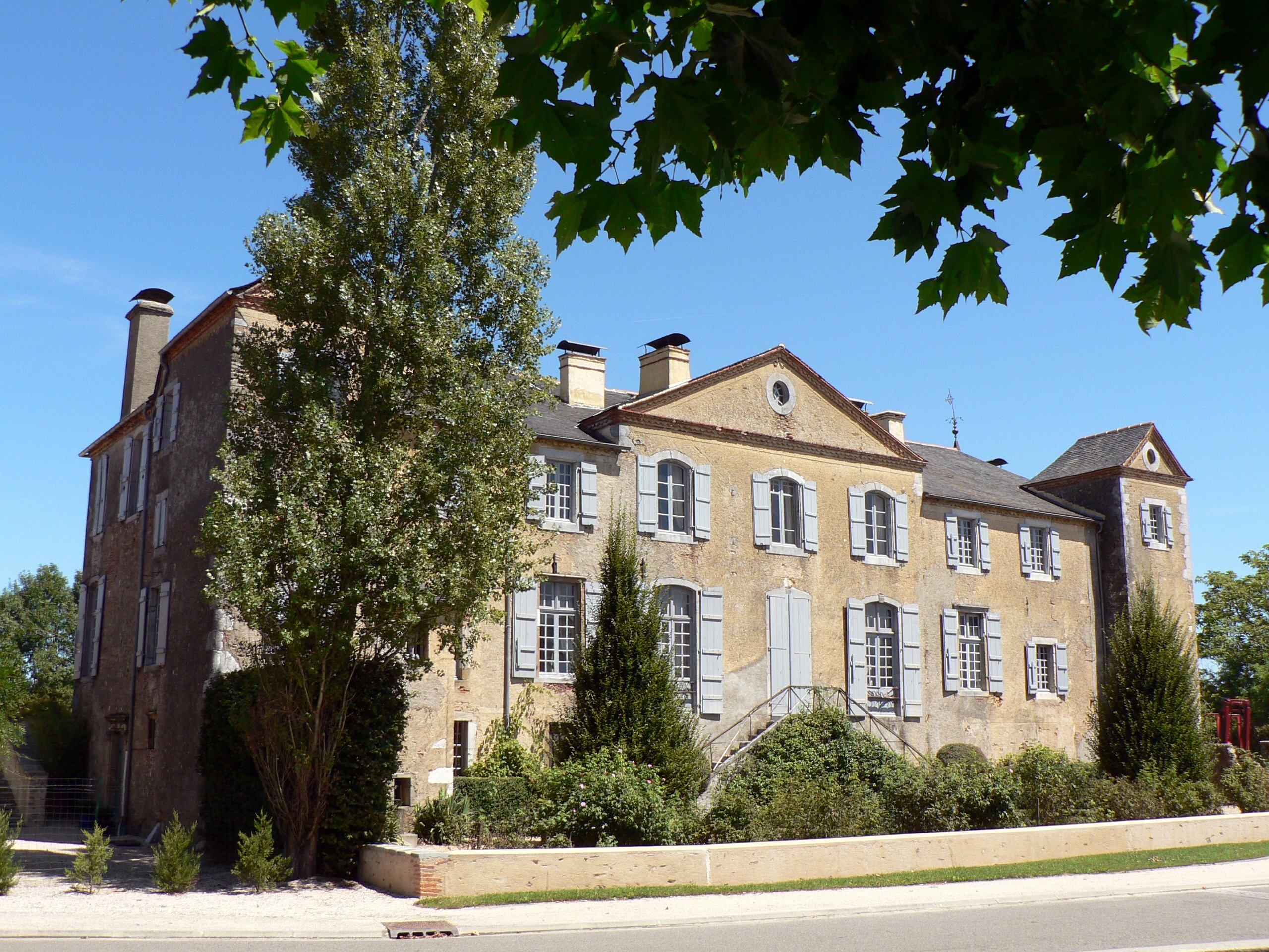 Château de Gardères, 65185 Gardères